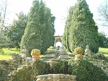 Scalinata settecentesca di Villa Cicogna Mozzoni a Bisuschio. Foto personale. Giugno 2003.